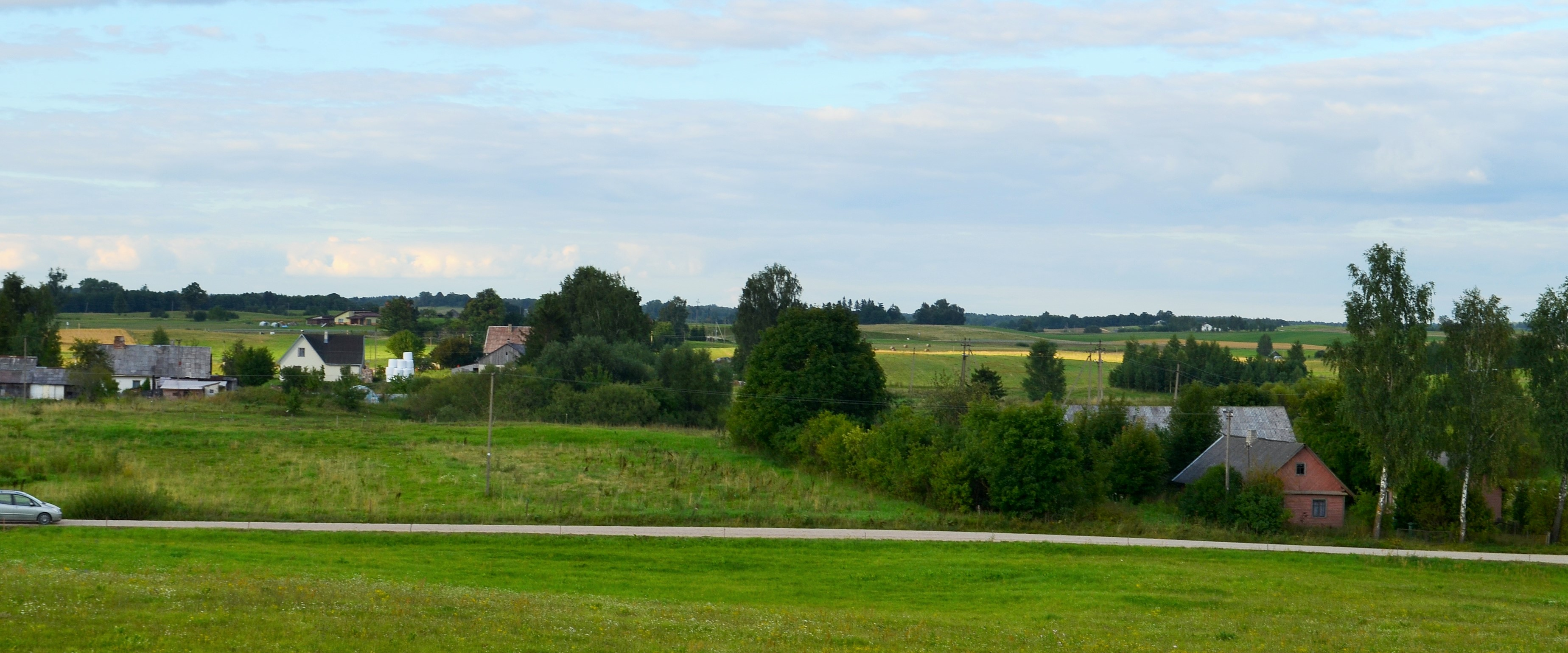 Poteronys, Alytaus raj.